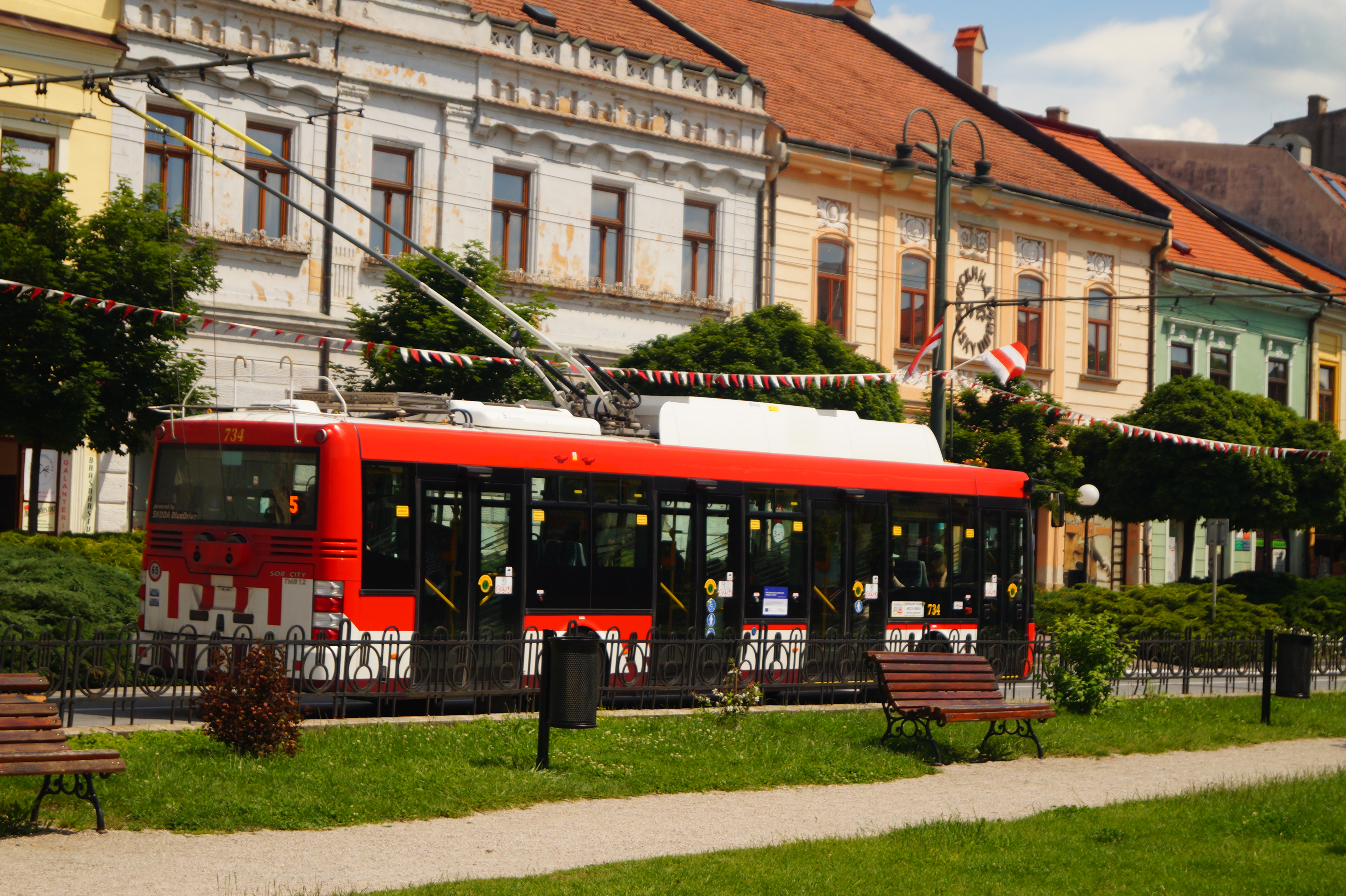 Trolejbus Škoda 30Tr SOR na Hlavnej ulici